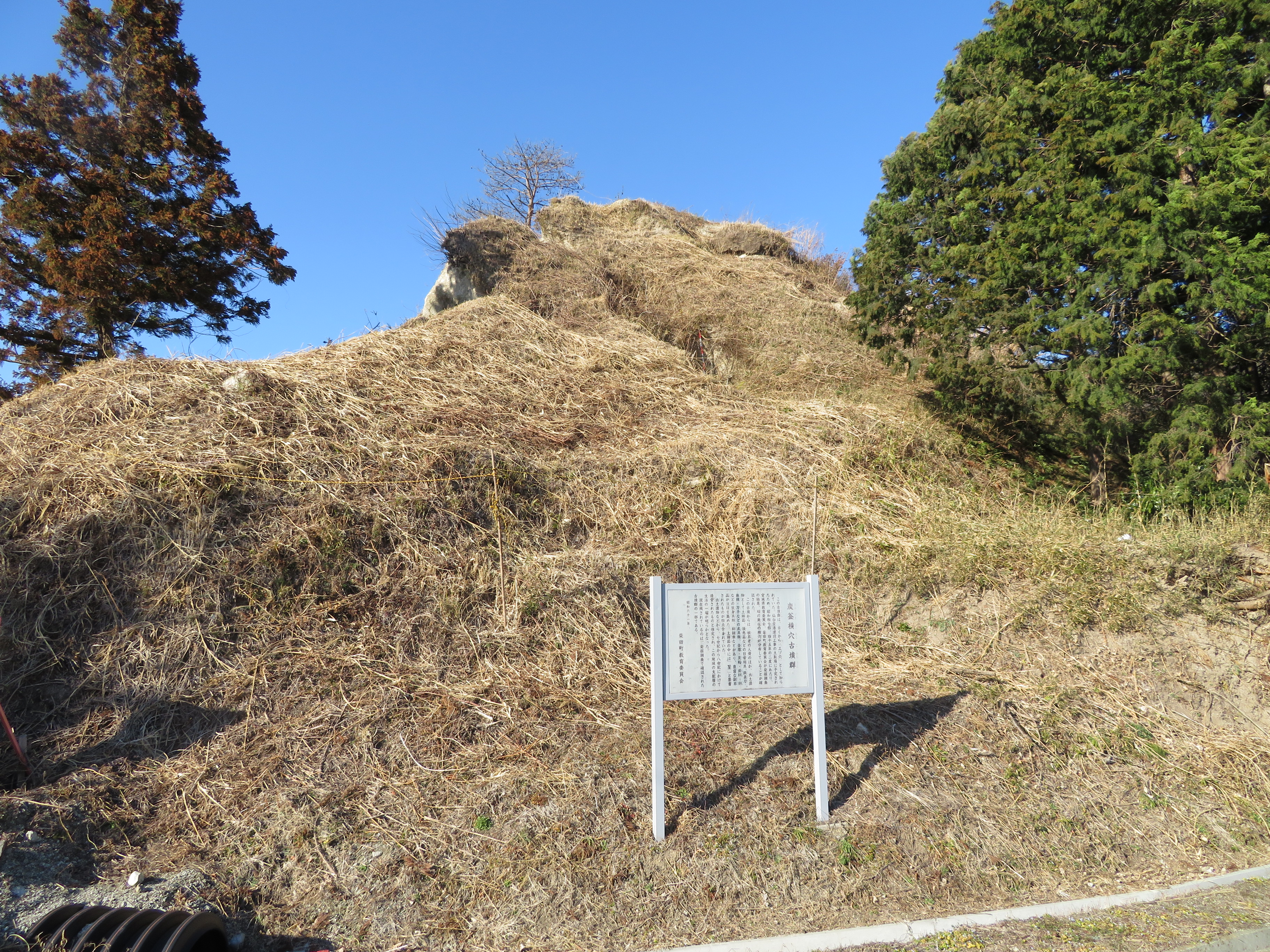 日本宮城県炭釜横穴古墳群。後方は土砂採取の工事により破壊。上部、ポールの立っている場所に確認できる横穴が、この古墳で現在見られる最大の横穴墓。